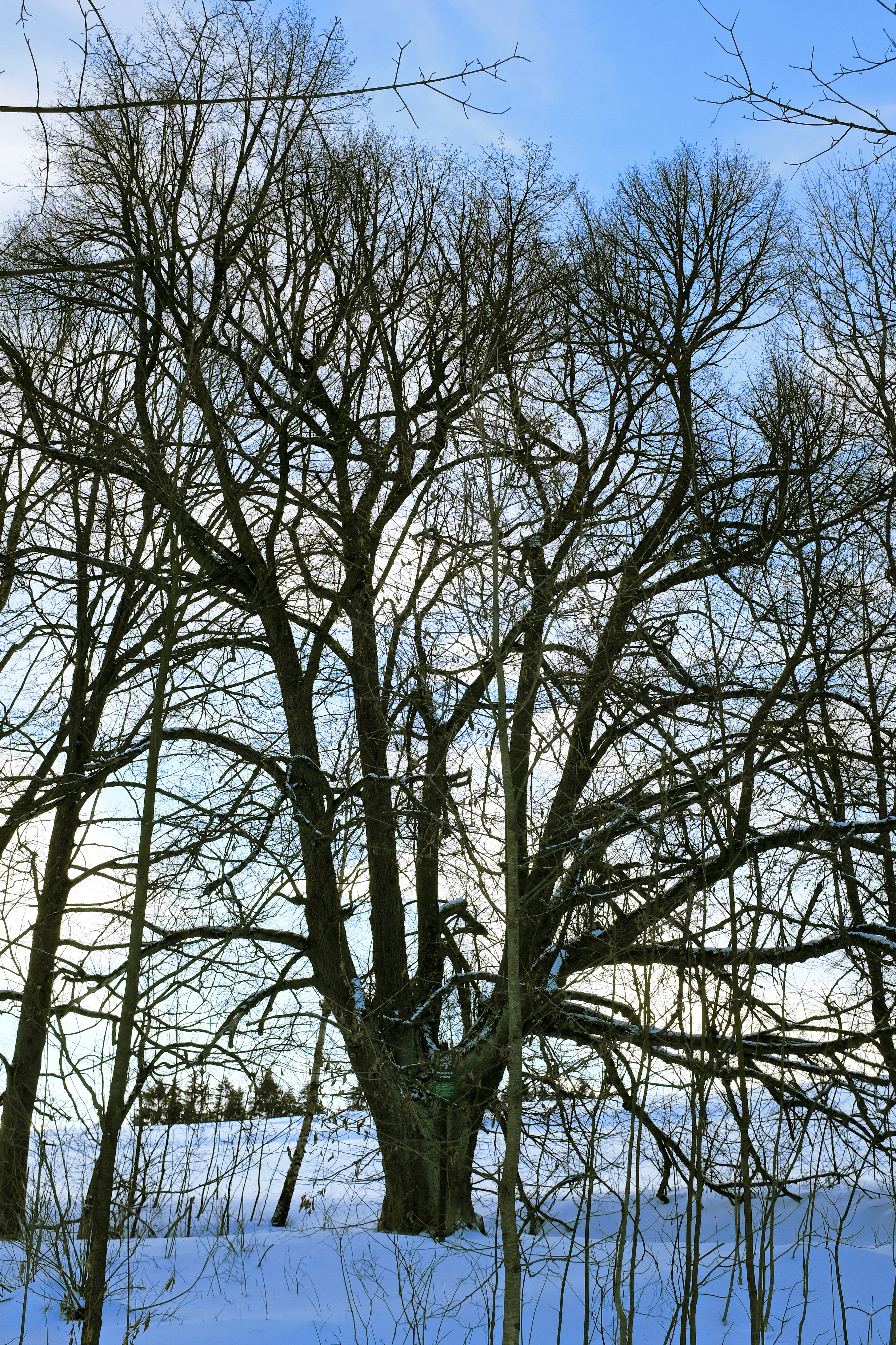 Památný strom - Lípa v Krásné u Kraslic, Krásná, část města Kraslice, okres Sokolov